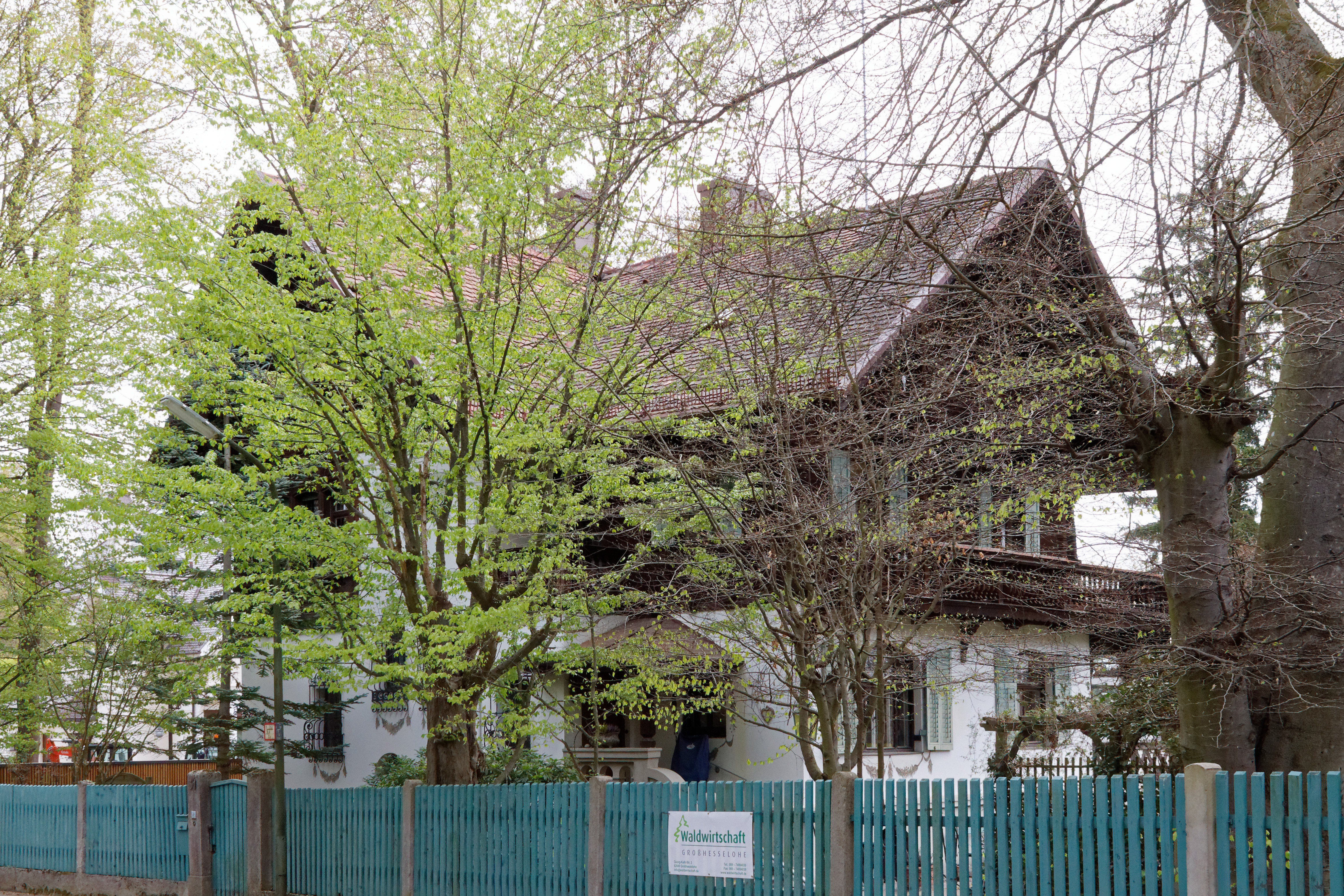 Villa Scheibe in der Heilmannstraße 33 in München